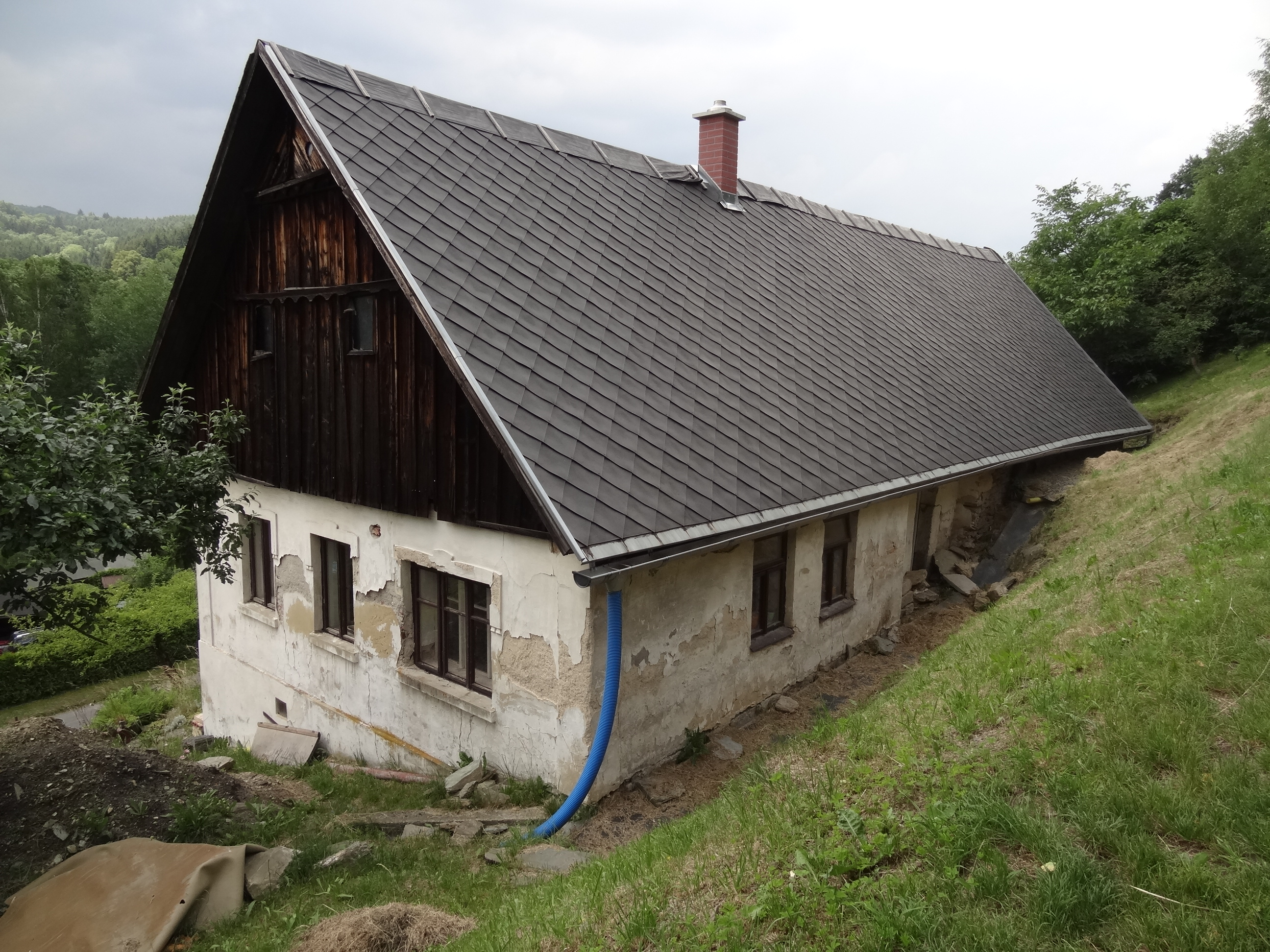 Líšný 2.díl - chalupa čp. 53